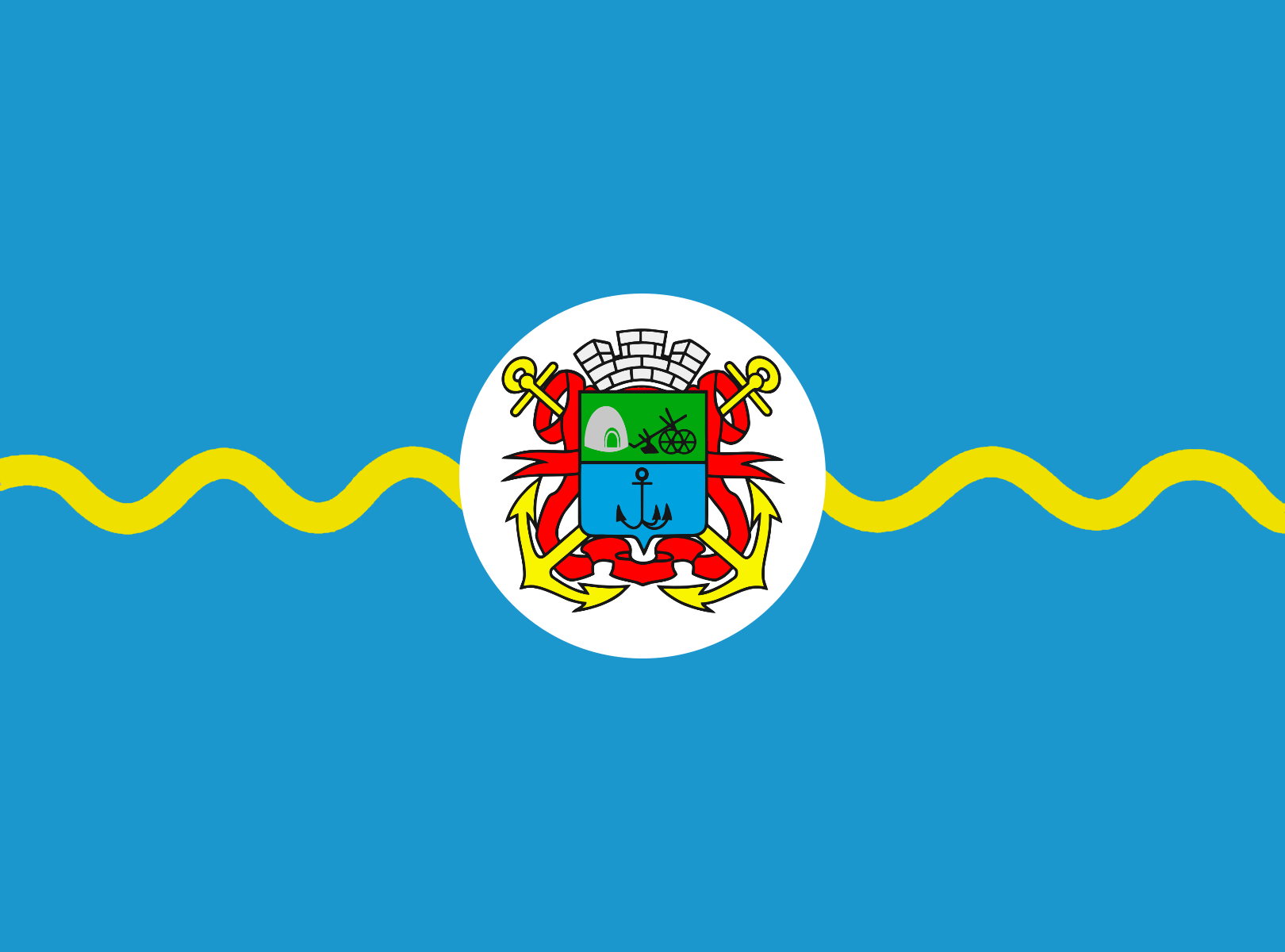 Прапор Бердянська.